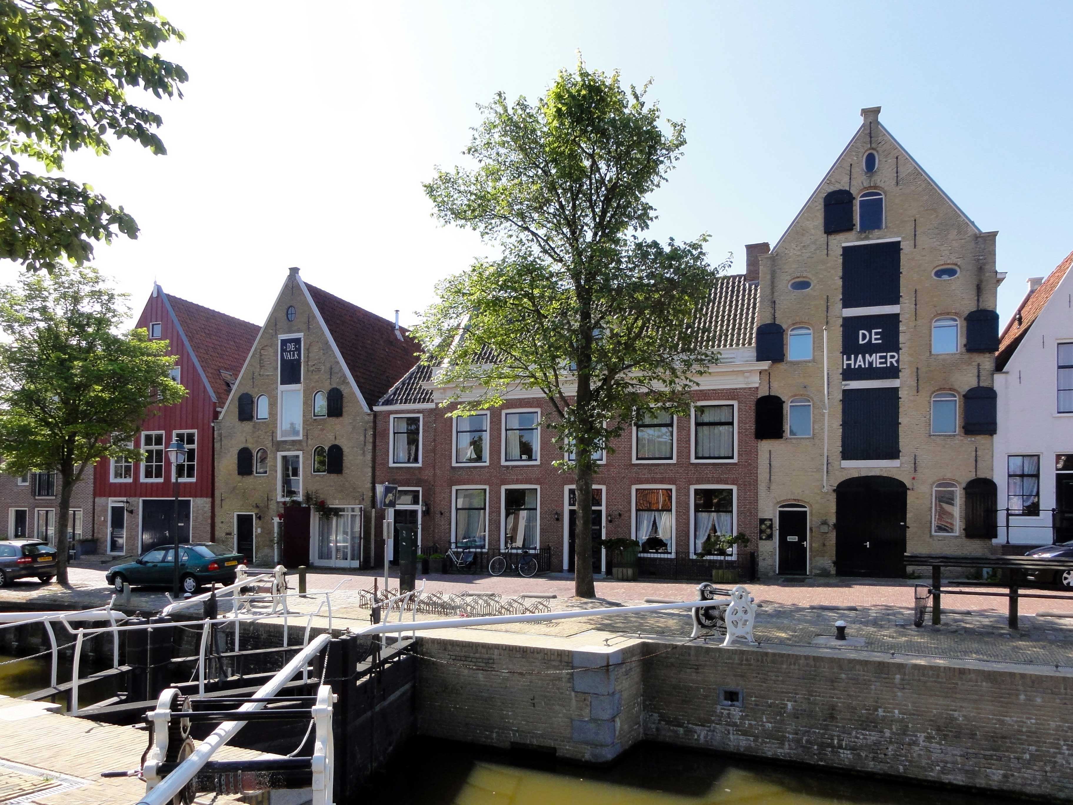 Rozengracht 6 t/m 10 met o.a. De Hamer en De Valk in Harlingen